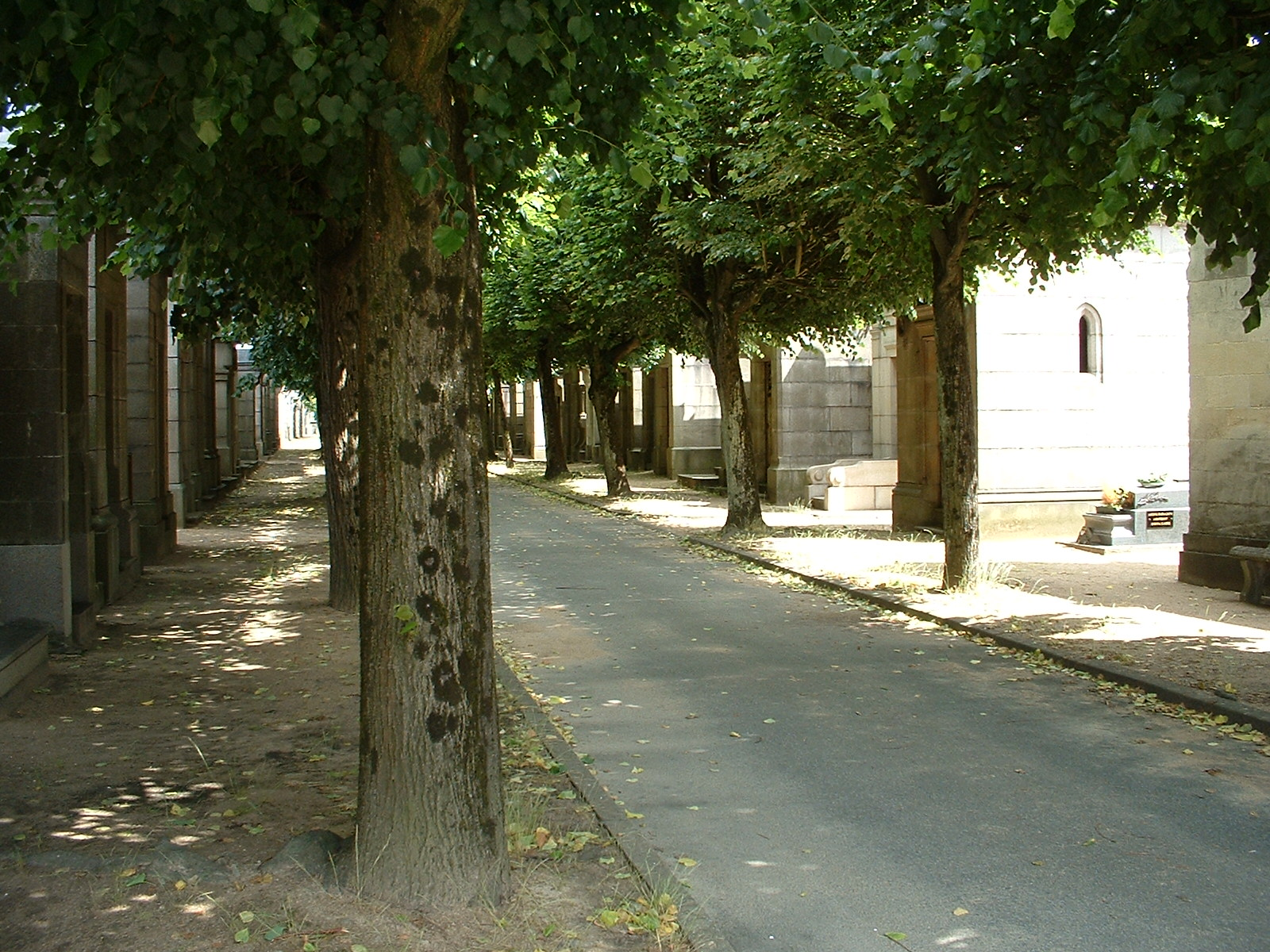 Nantes (France) - Cimetière Miséricorde - Allée centrale